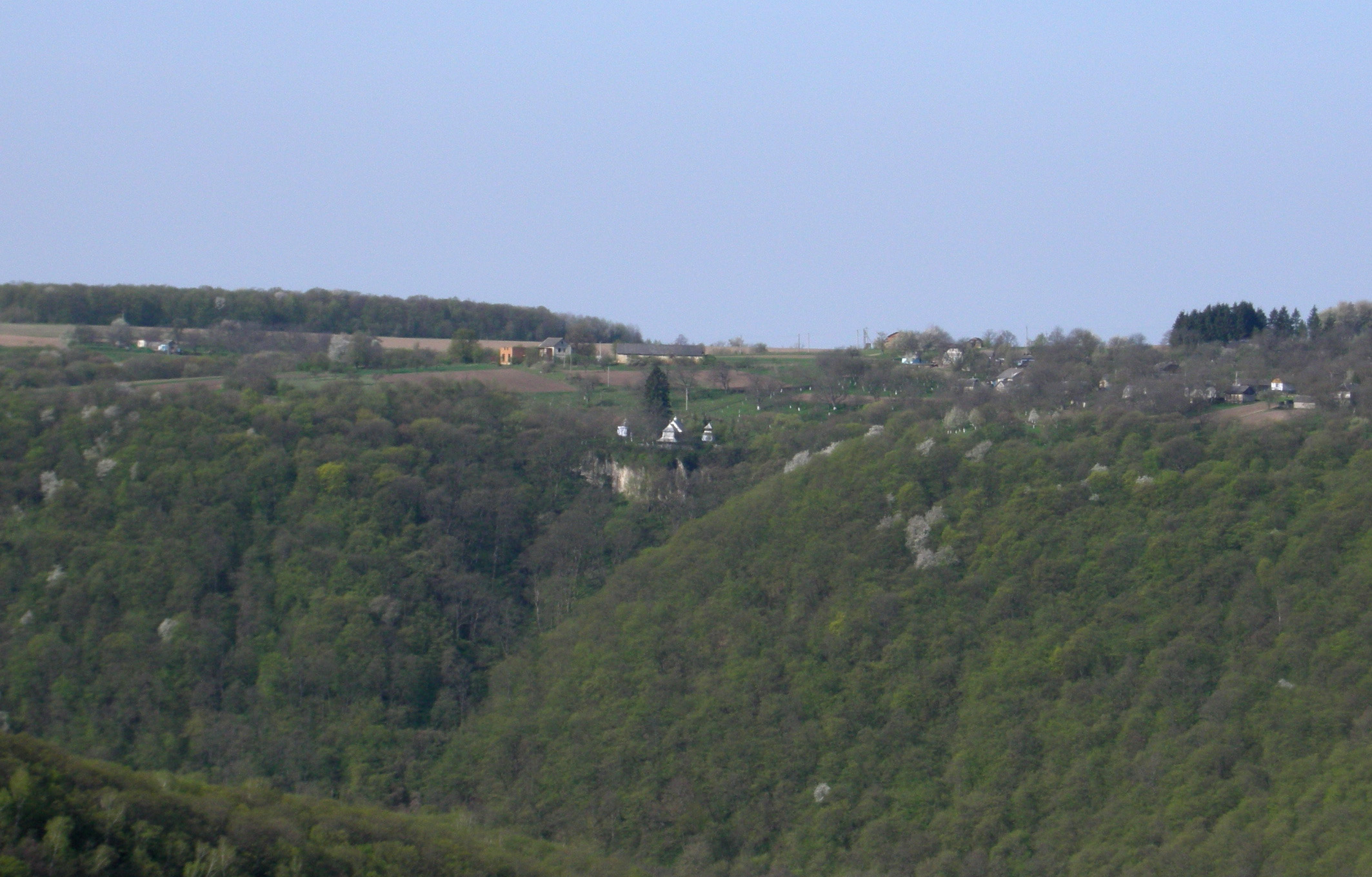 Вид на село Сокілець (Бучацький район Тернопільської області), дерев'яну церкву Покрови Пресвятої Богородиці і «Монастирську скелю».